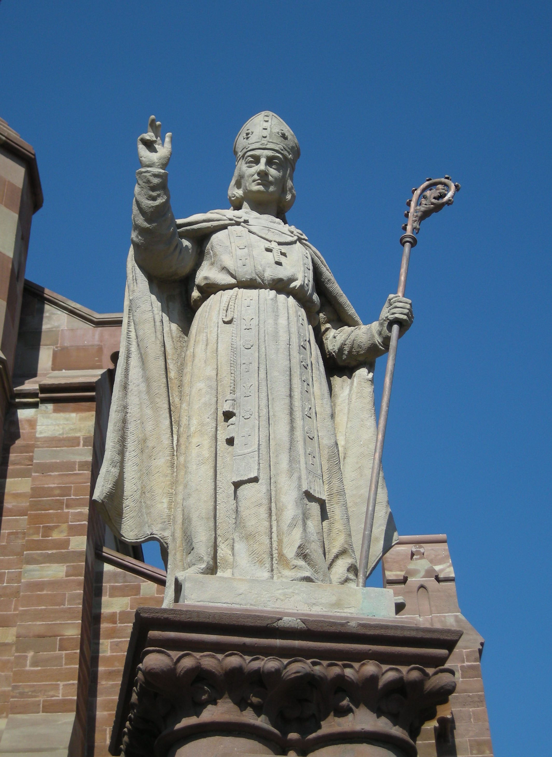 Statue en hommage à Jean II de Lichtenberg, évêque de Strasbourg, devant l'église de Still (Bas-Rhin), restaurée en 2008